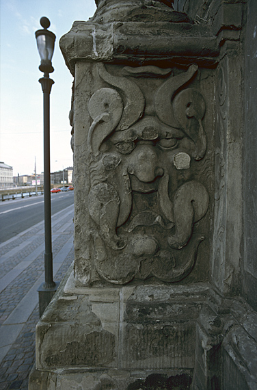 Detalj av entrén, grotesk i relief. Motiv: Landshövdingeresidenset Nyckelord: Riksintressen Kategori: Landstatshus/länsstyrelse, Skulpturer Detalj av entrén, grotesk i relief.